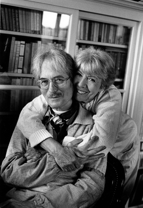 Walter Weideli, écrivain, et Mousse